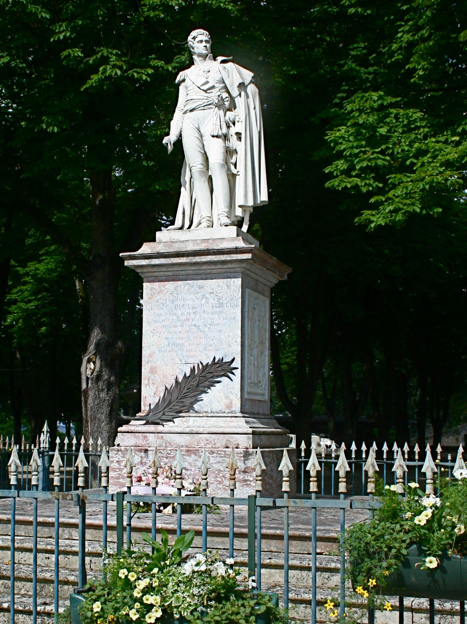 Statue du Maréchal Lannes, par Cortot, à Lectoure (Gers, France)